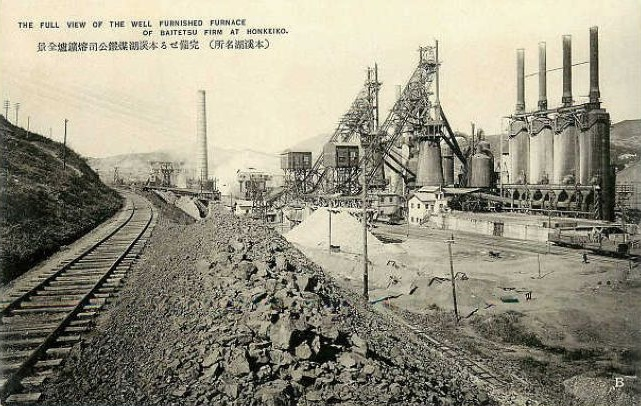 中文（香港）: 本溪湖煤鐵有限公司的機器